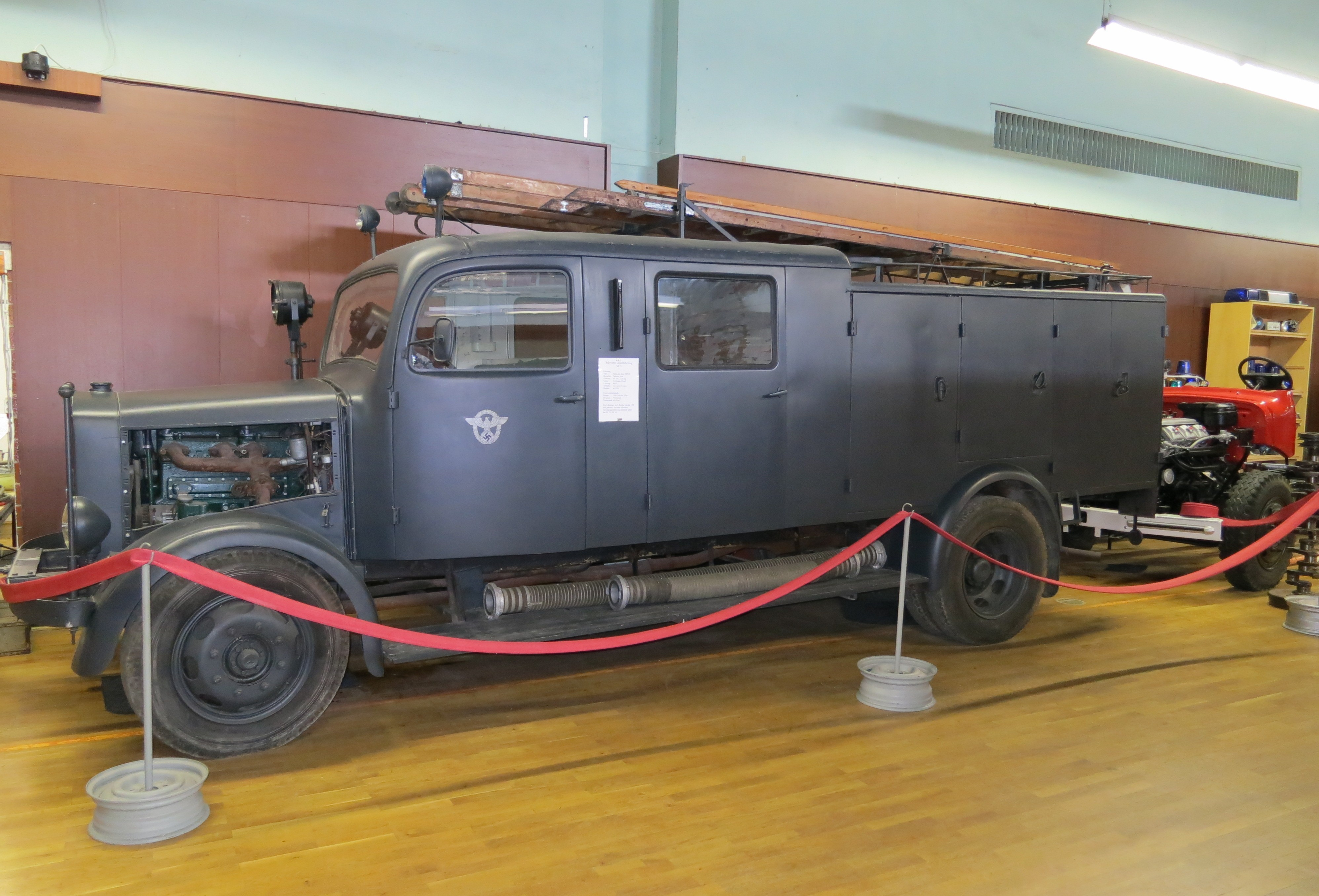 Mercedes-Benz SLG (Schweres Löschgruppenfahrzeug) im Internationalen Feuerwehrmuseum Schwerin.